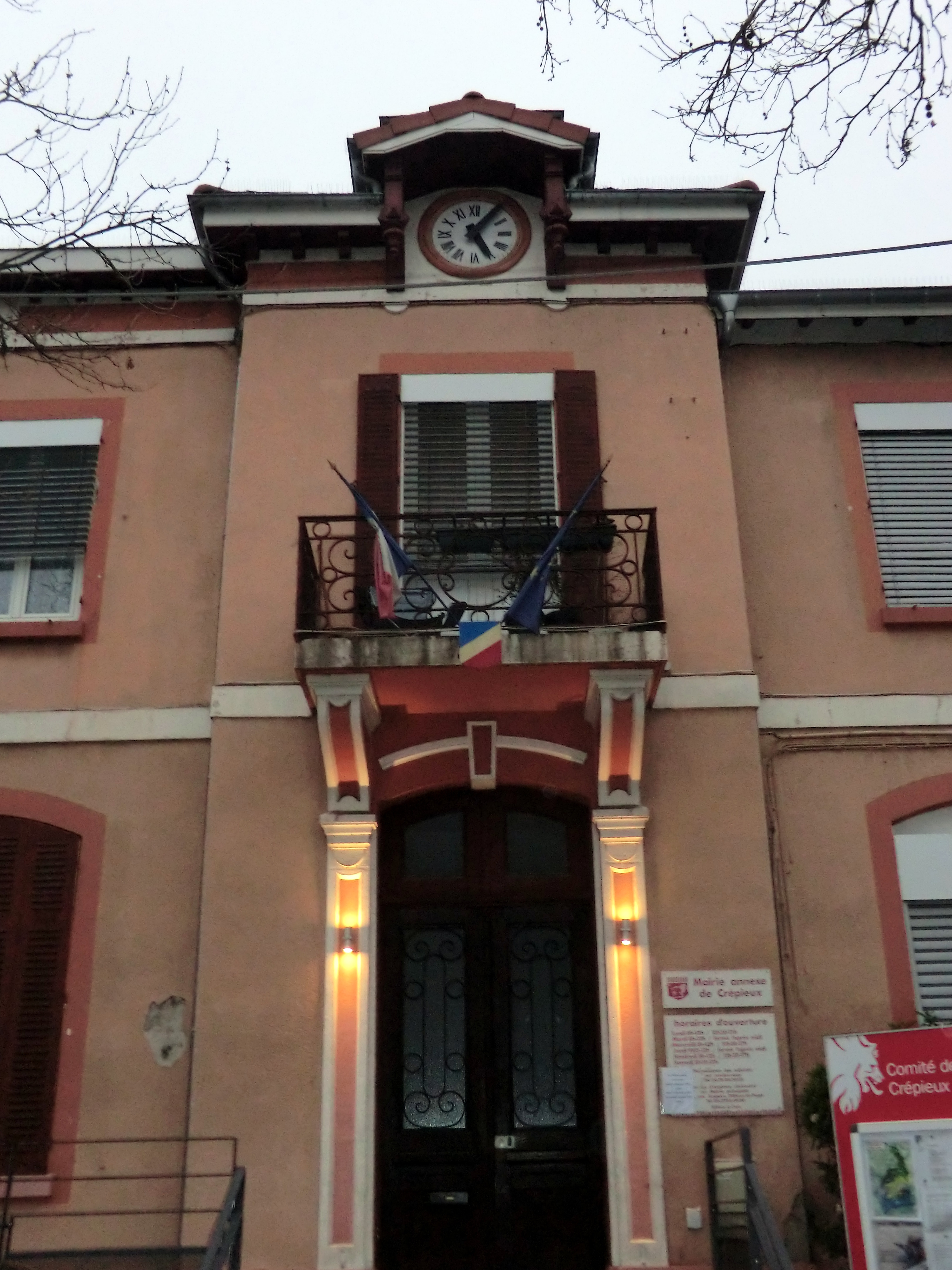 Town hall of Crépieux-la-Pape.